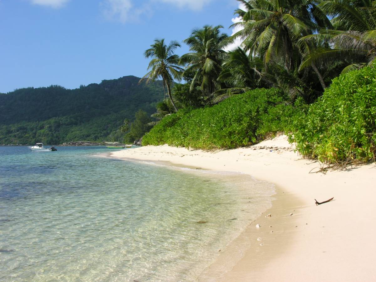 Seychelles, Mahé Island